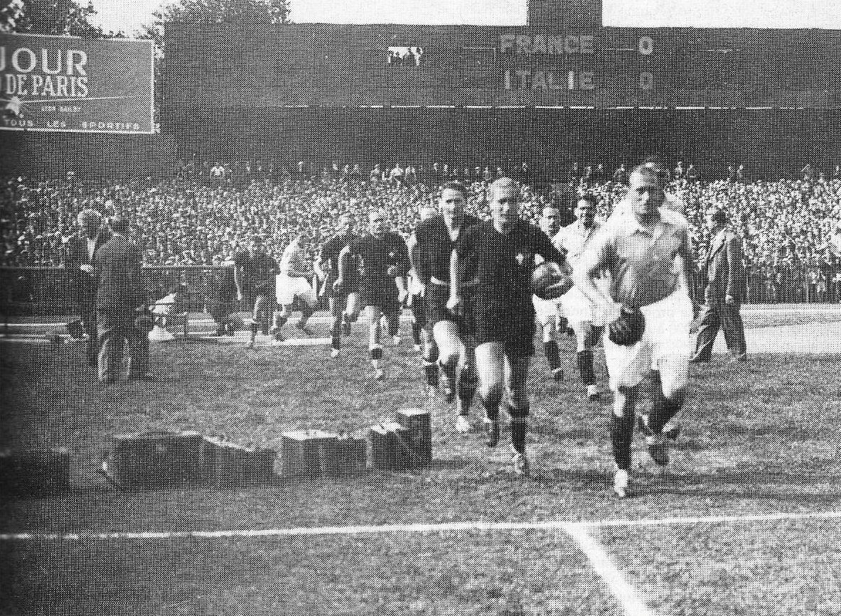 Coup d'envoi de France - Italie à Colombes, en coupe du monde de football 1938